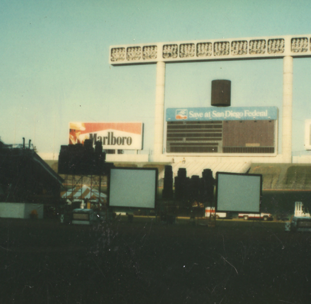 Farebný prenosný systém Kool Jazz Festival 1978